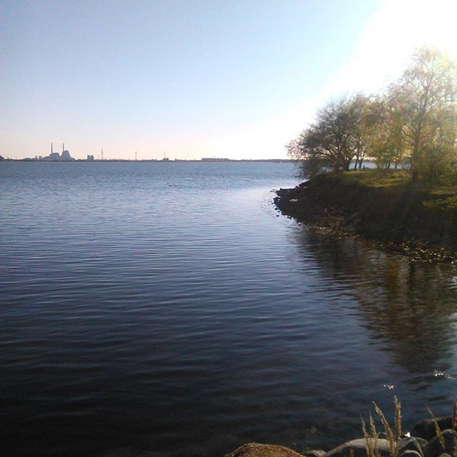 Sydhavnstippen. Wikiwednesday 4.5. 2016